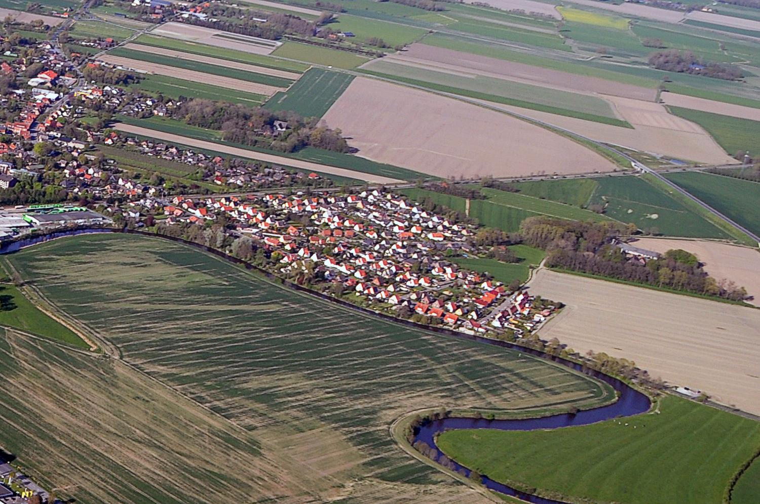 das Gut Wellingsbüttel recht unten, versteckt hinter Bäumen hinter der Siedlung